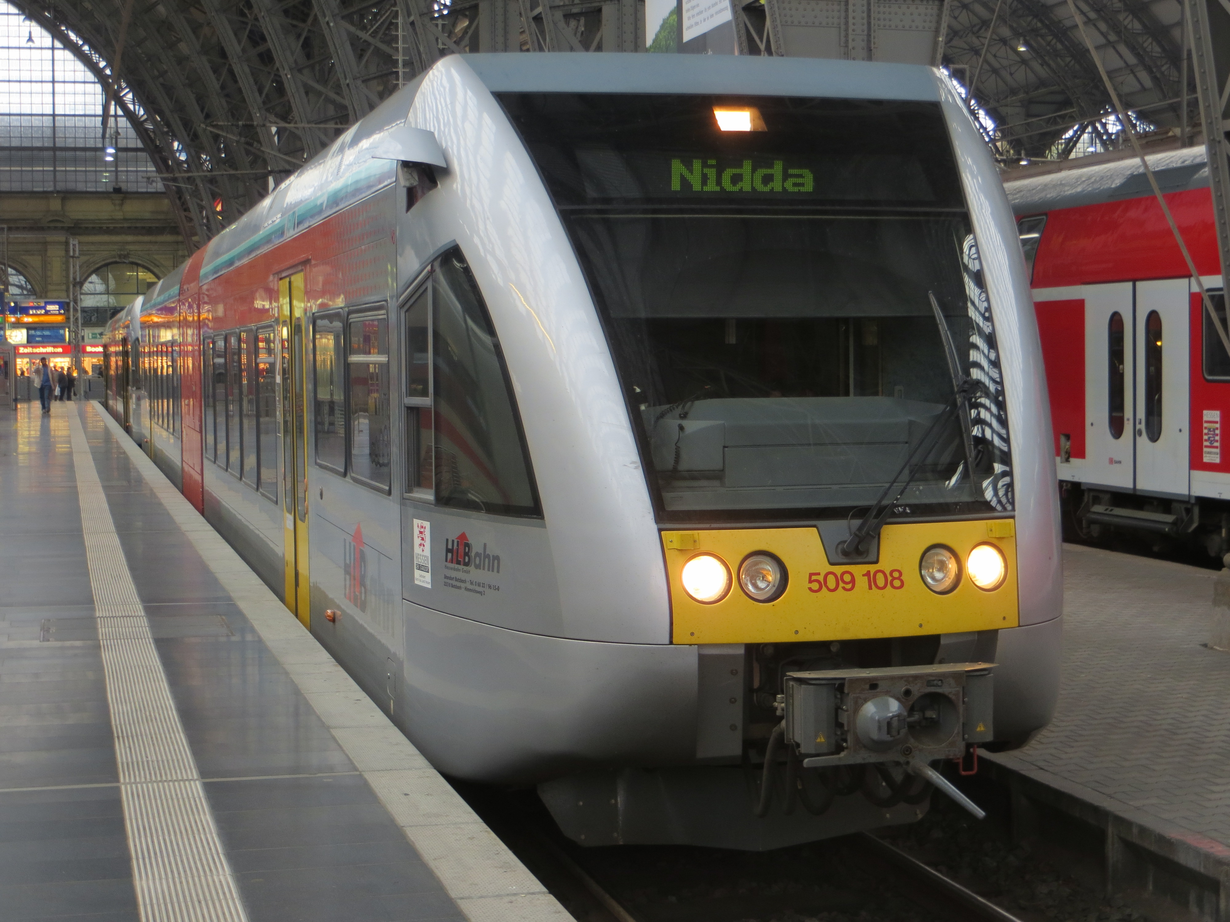 Trainset nr 509 108